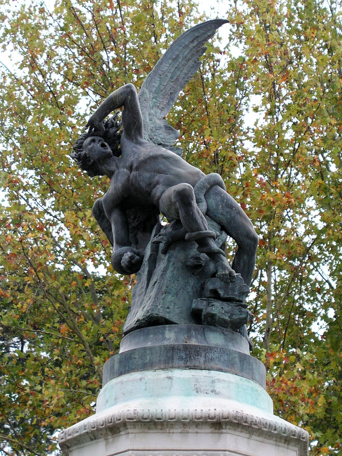 El Ángel Caído / The Fallen Angel. Jardines del Buen Retiro, Madrid, Spain.